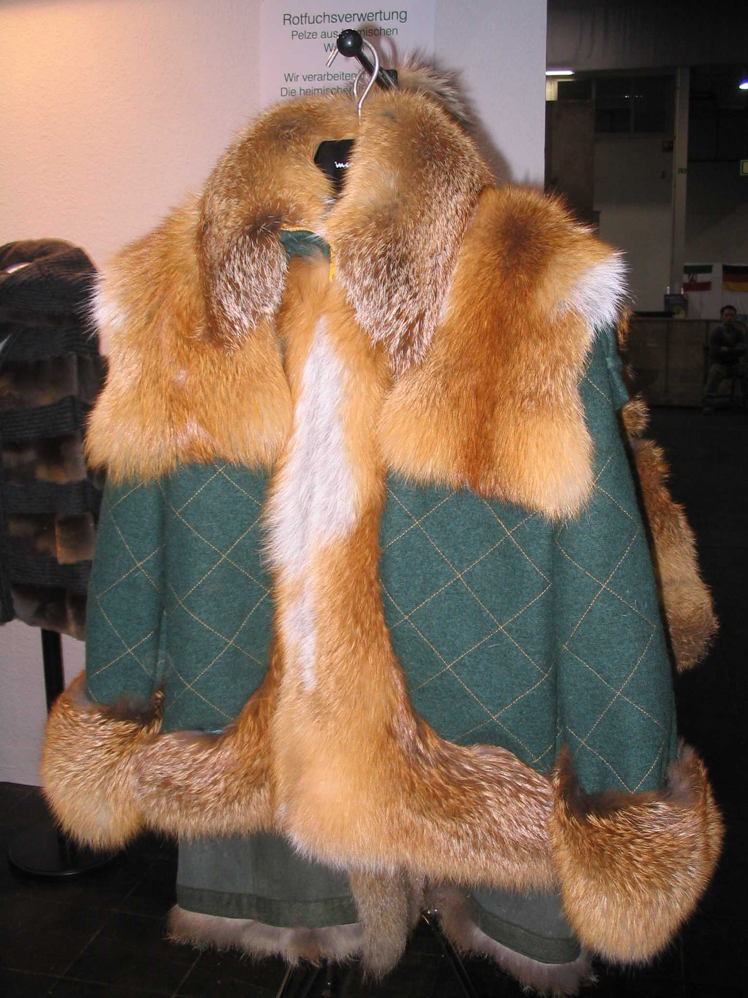 Rotfuchsjacke mit Loden. Design und Ausführung: Kürschnermeister Jörg Paulussen, Rotenburg an der Fulda. „Redfox-Fashion-Award“, ein Wettbewerb zur Förderung der Nutzung der anfallenden einheimischen Felle, insbesondere der Rotfuchsfelle. Teilnahmeberechtigt waren die Mitglieder des Zentralverbands des deutschen Kürschnerhandwerks und die Kürschner Österreichs, der Schweiz und der Niederlande. Sponsoring u. a. durch die Zeitschrift „Wild und Hund“, Messe „Jagd und Hund“. Anlässlich und auf der Messe „Jagd und Hund“, Dortmund Westfalenhallen, 29. Januar bis 3. Februar 2013.